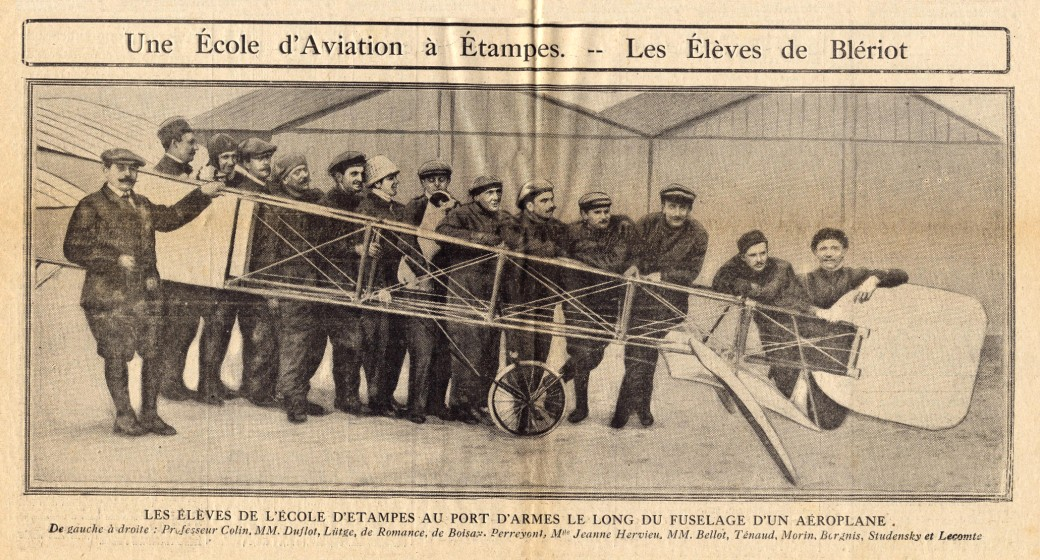 Cliché présentant les élèves de l'école Blériot à Etampes en 1910 parut dans le journal Excelsior du 17 novembre 1910.